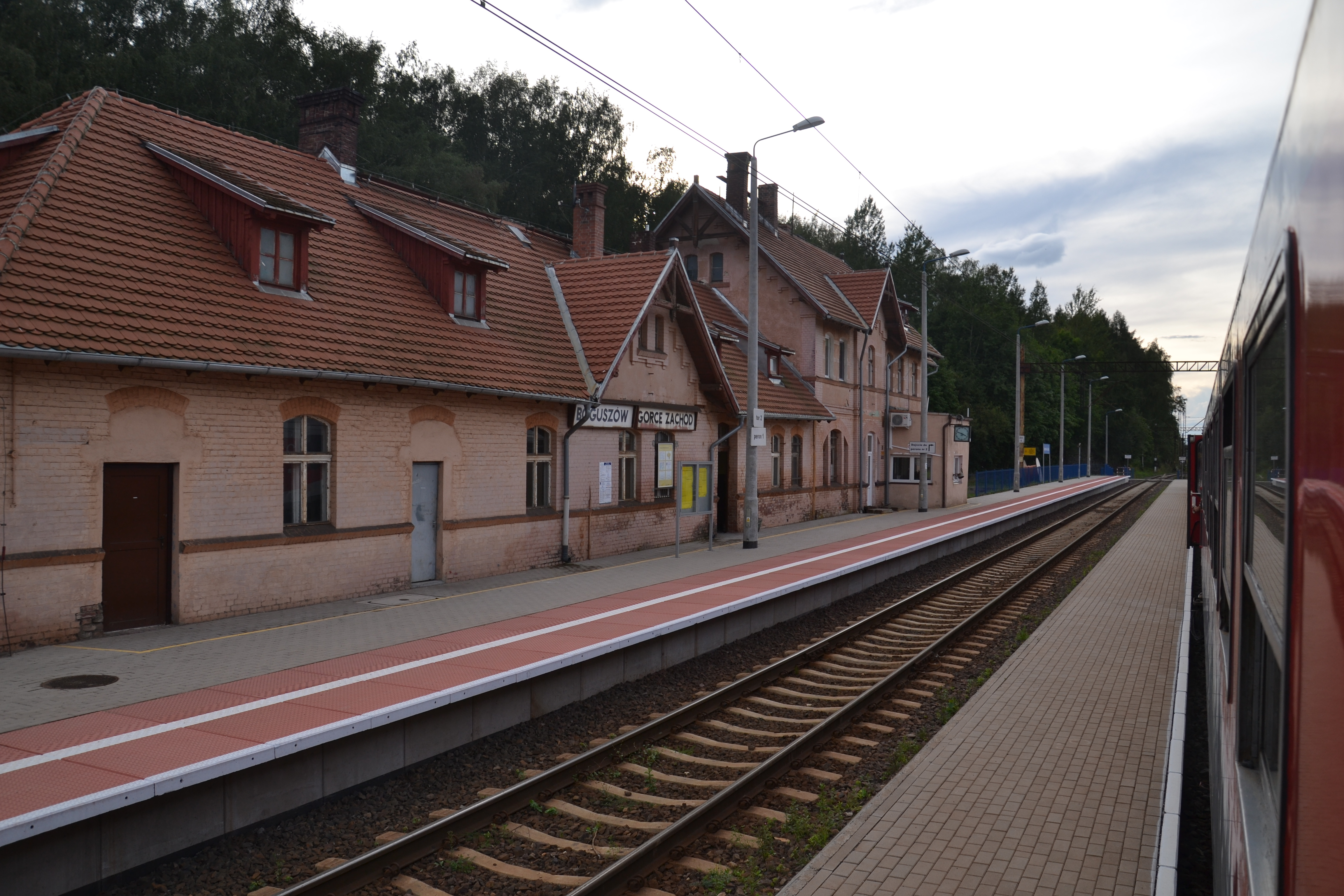 Dworzec kolejowy Boguszów Gorce Zachód